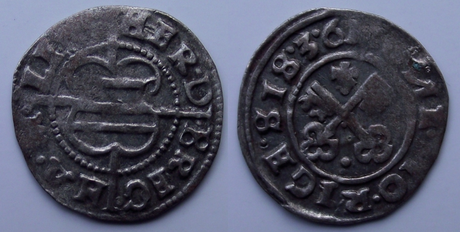 Riia killing. Hermann von Brüggenei. 1536